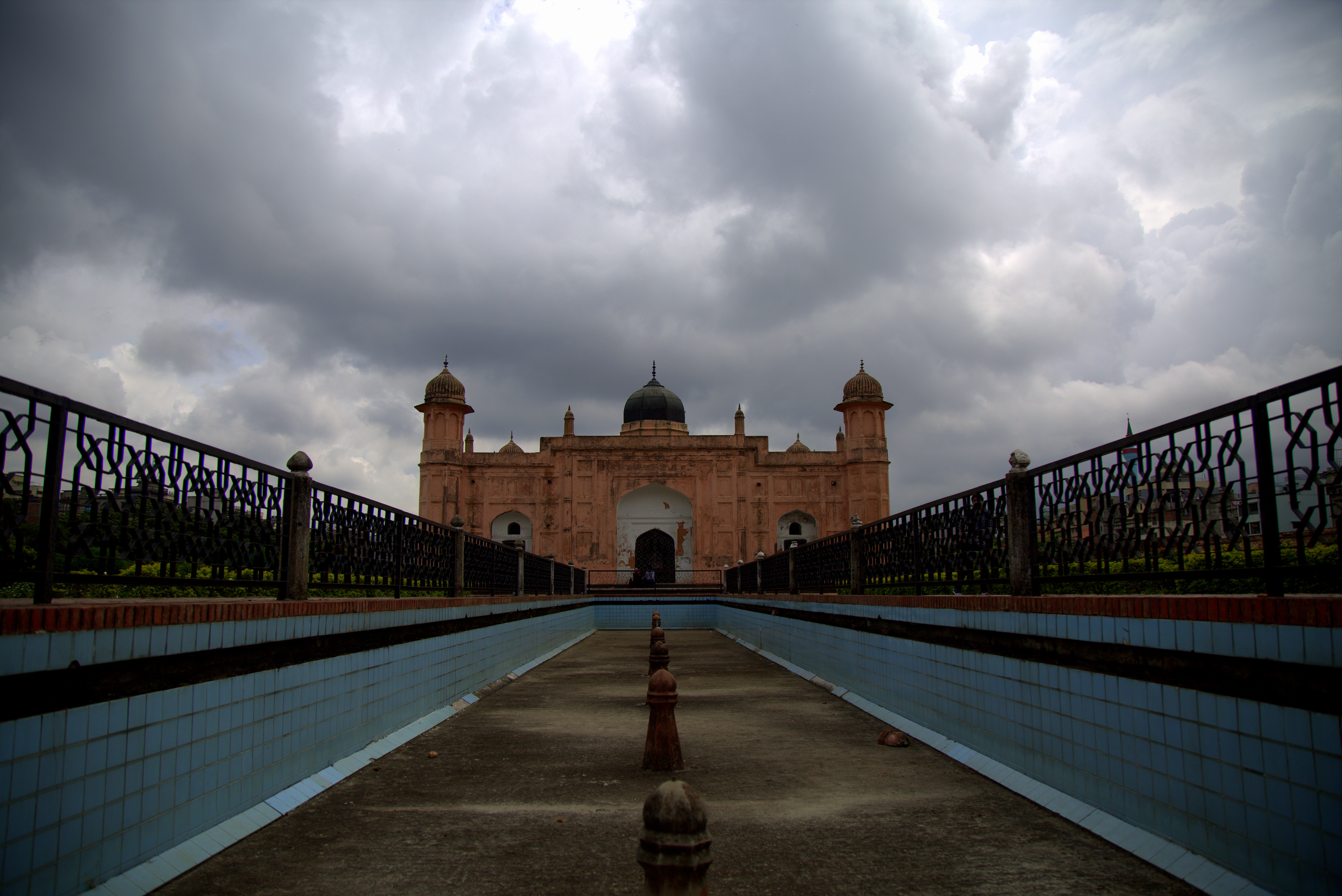 লালবাগ দুর্গ